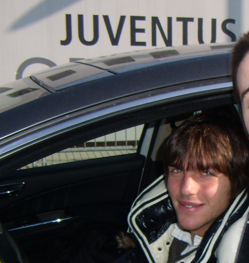 De Ceglie a Vinovo nel 2009